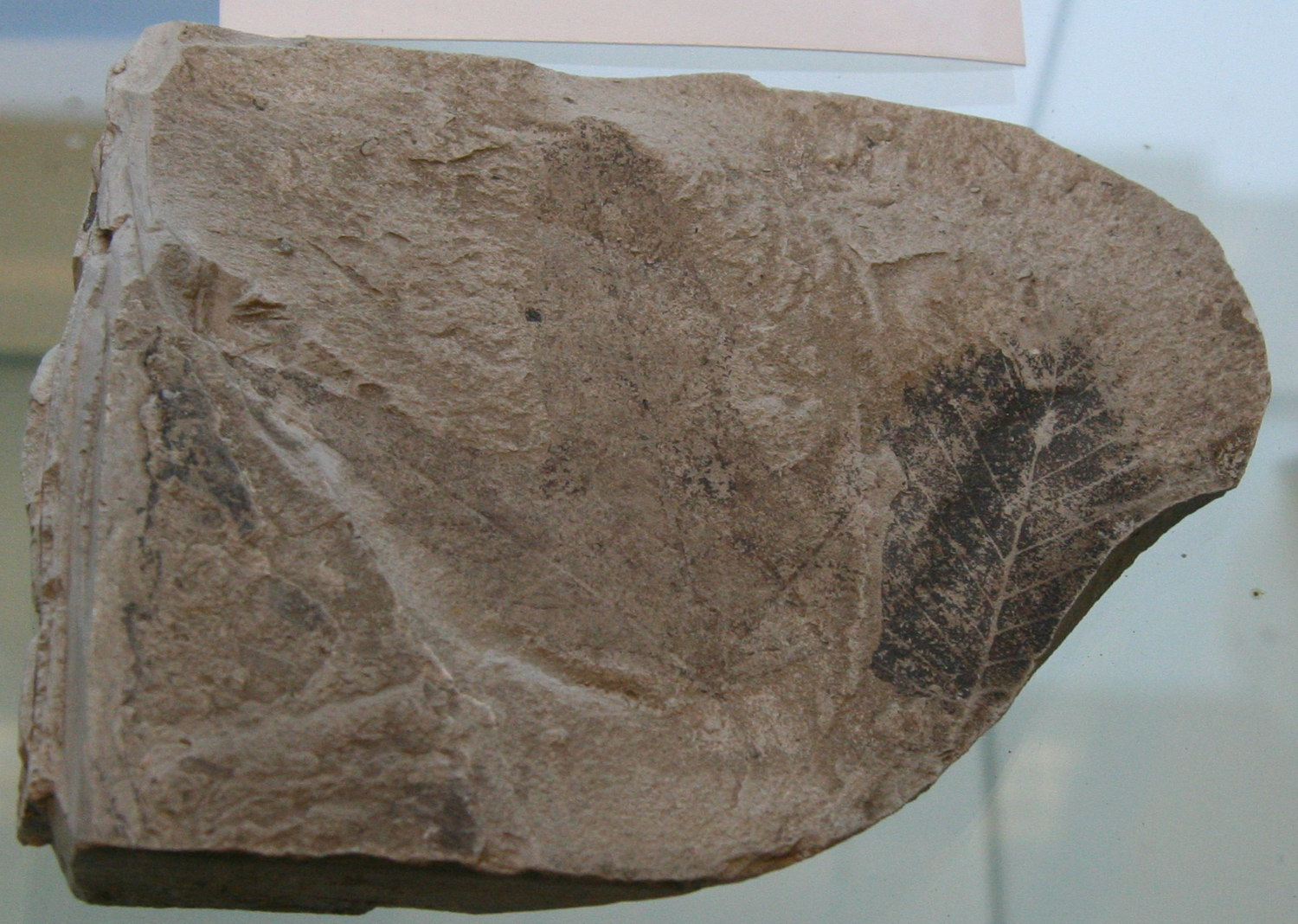 fossiles Blatt von Acer angustilobum im Botanischen Garten Dresden